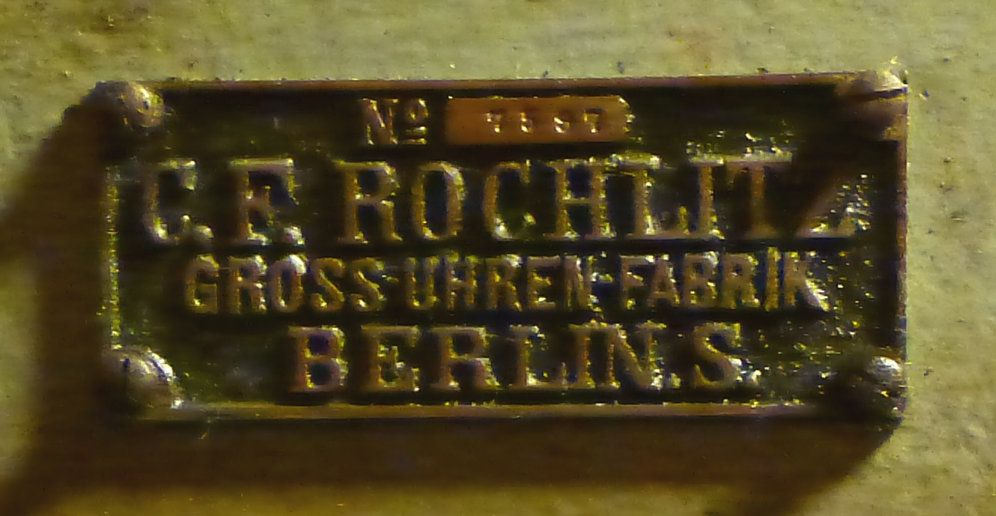 Tyska kyrkans tornur, det gamla verket, typskylt "C.F. Rochlitz Grossuhrenfabrik Berlin S."